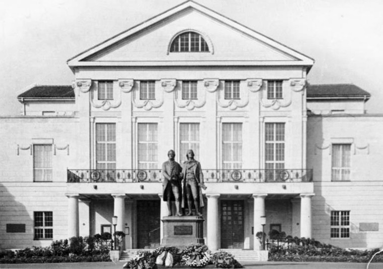 ADN-Zentralbild 9.8.1952 DDR: Das Nationaltheater in Weimar mit dem Goethe-Schiller-Denkmal